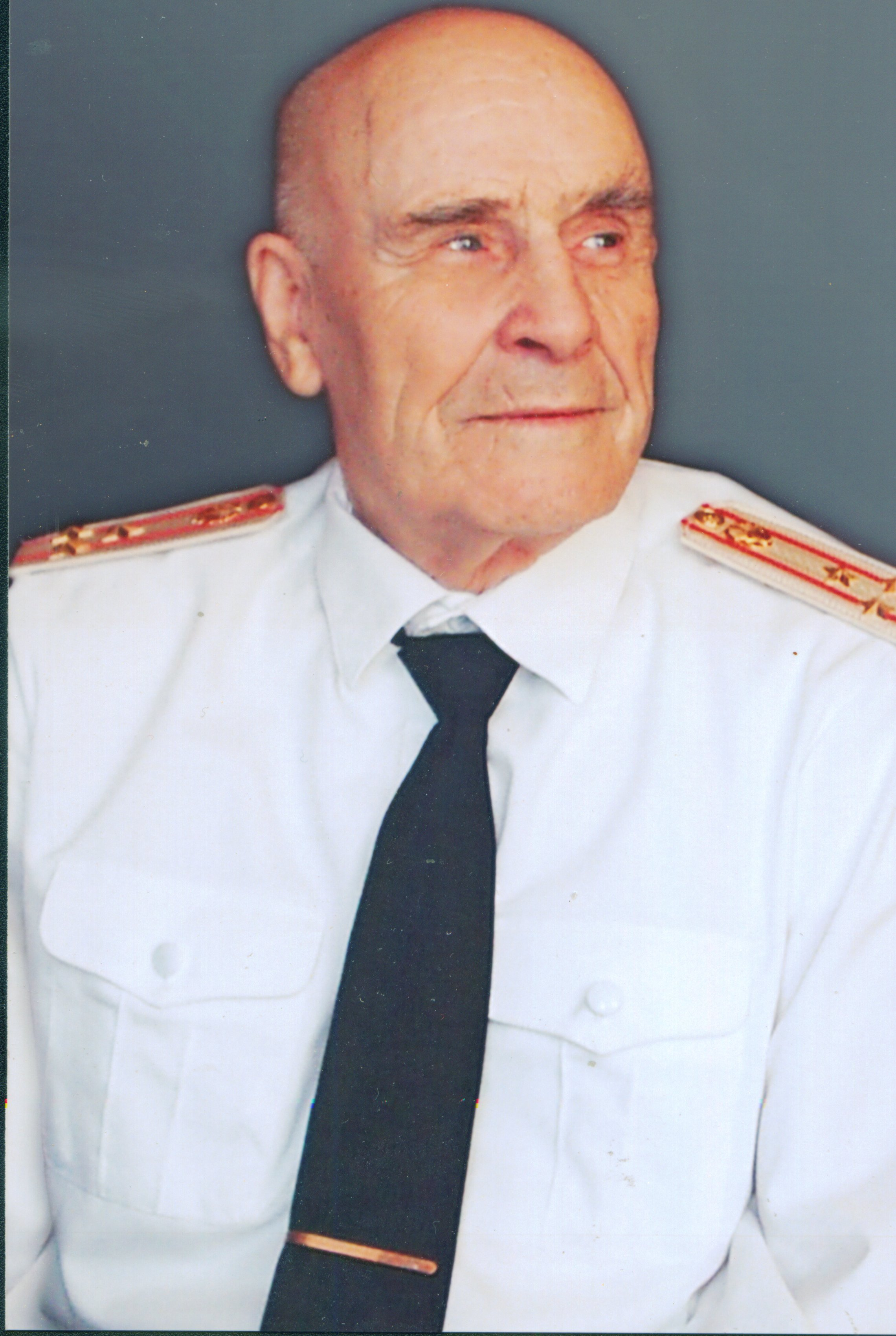 в день выпуска офицеров Ростовского военного института РВСН